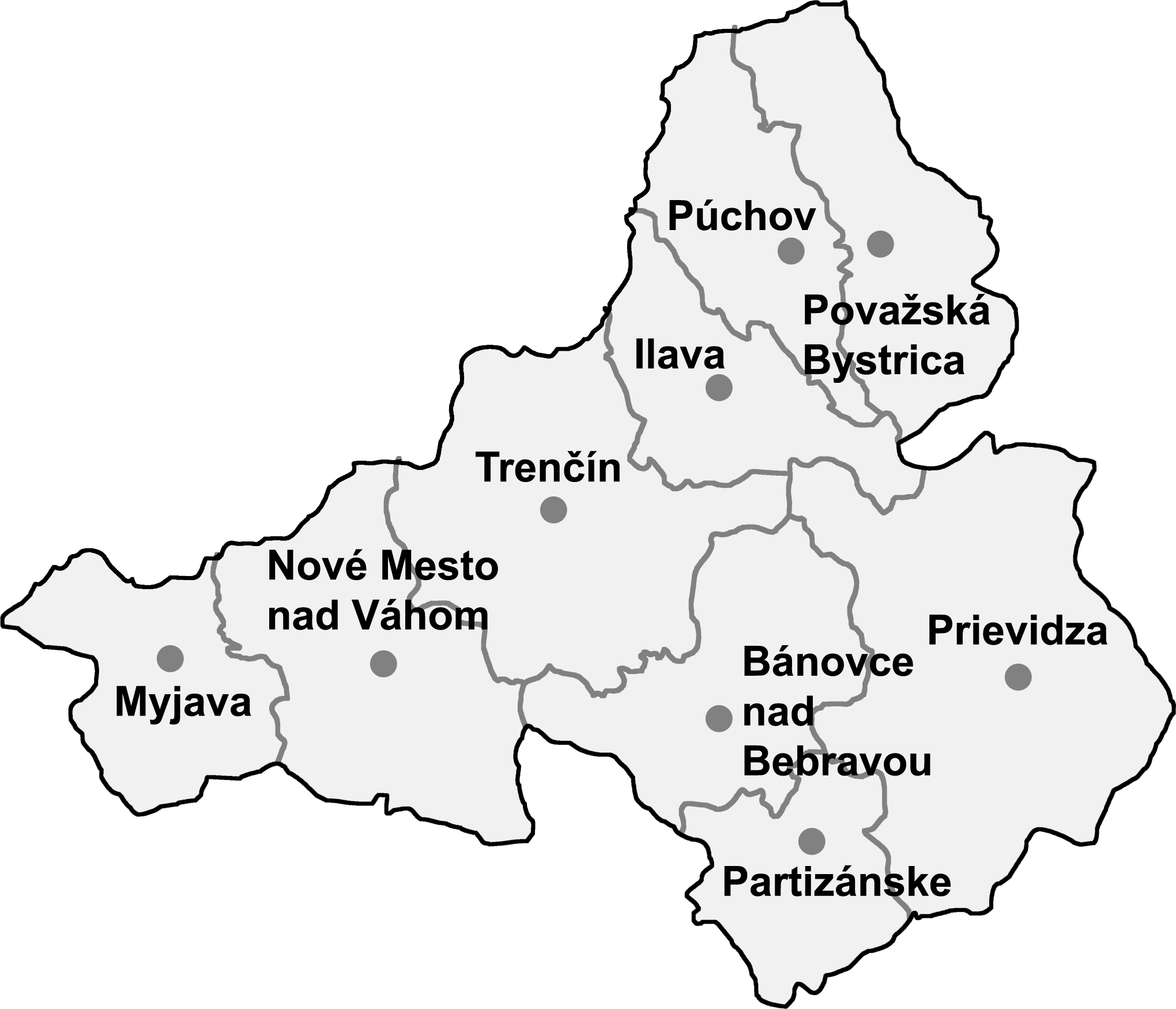 Trenčín region (kraj) with districts (okresy)